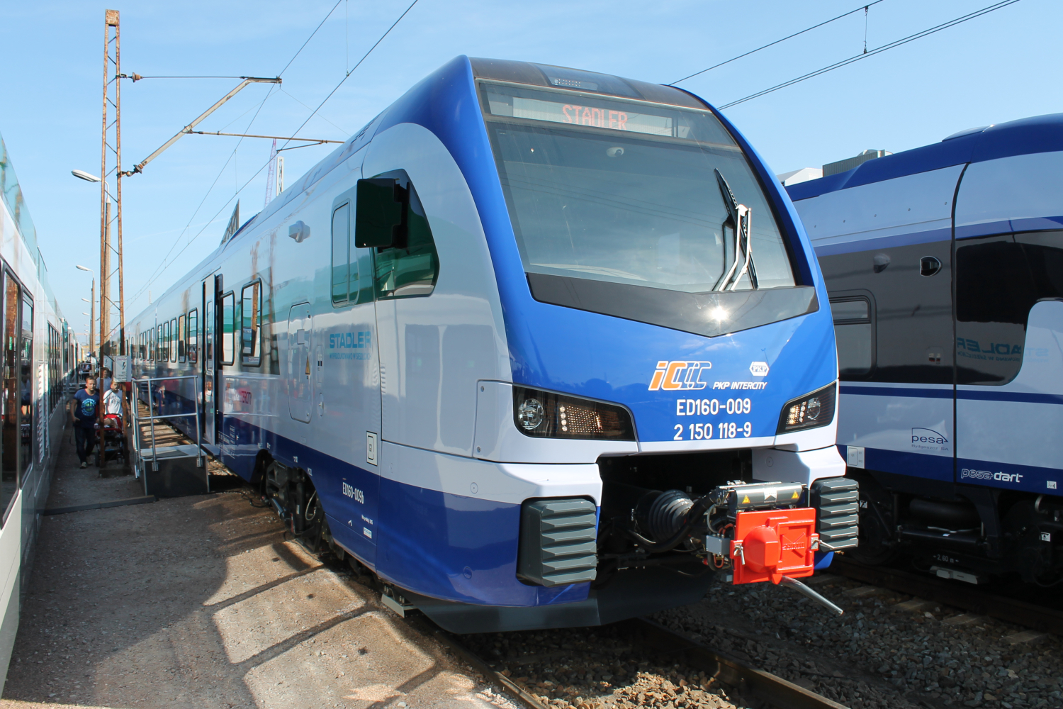 Elektryczny zespół trakcyjny Stadler FLIRT3 ED160-009 podczas targów Trako 2015. The making of this document was supported by Wikimedia Polska Association, within Wikigrant no. WG 2015-34. English | polski | +/−